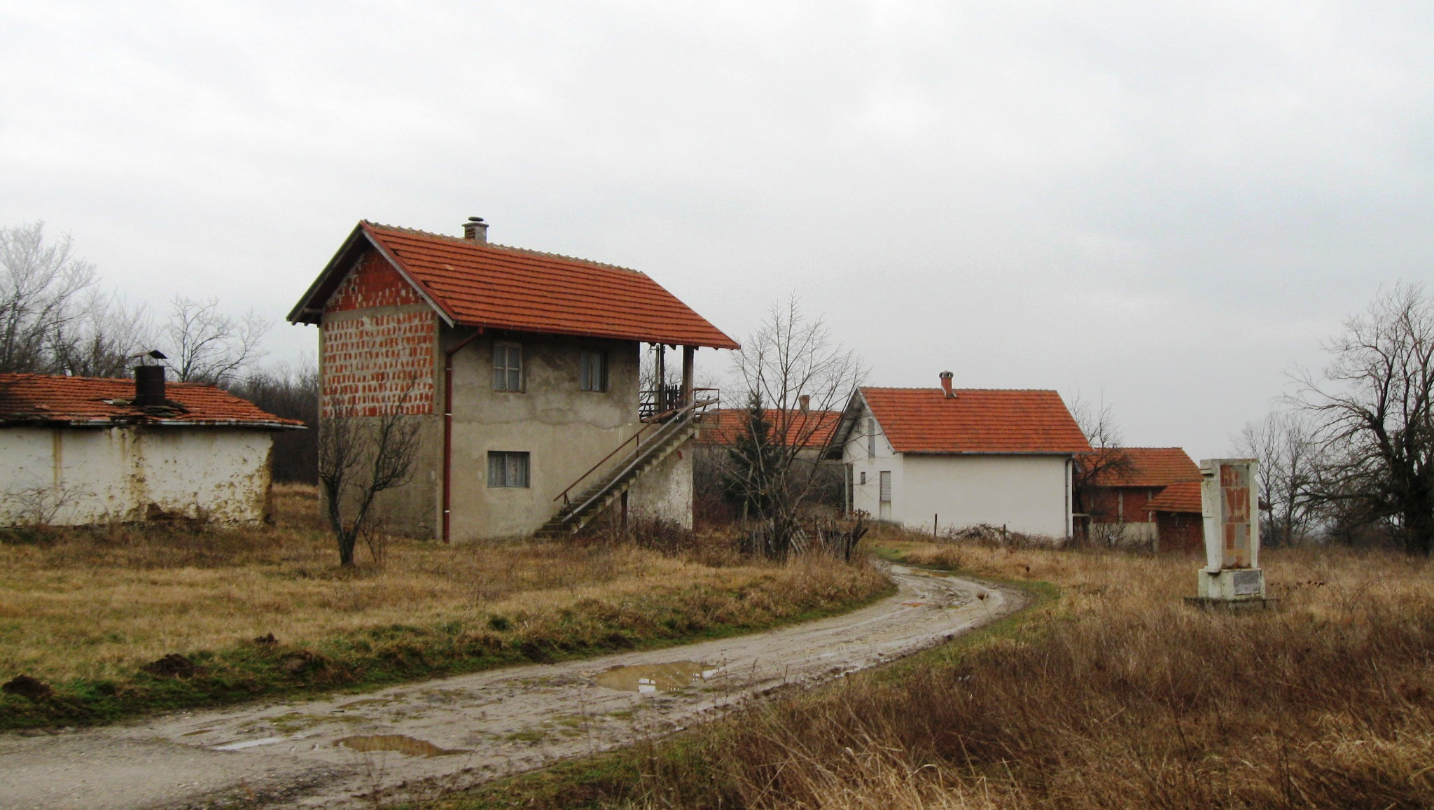 Turjane